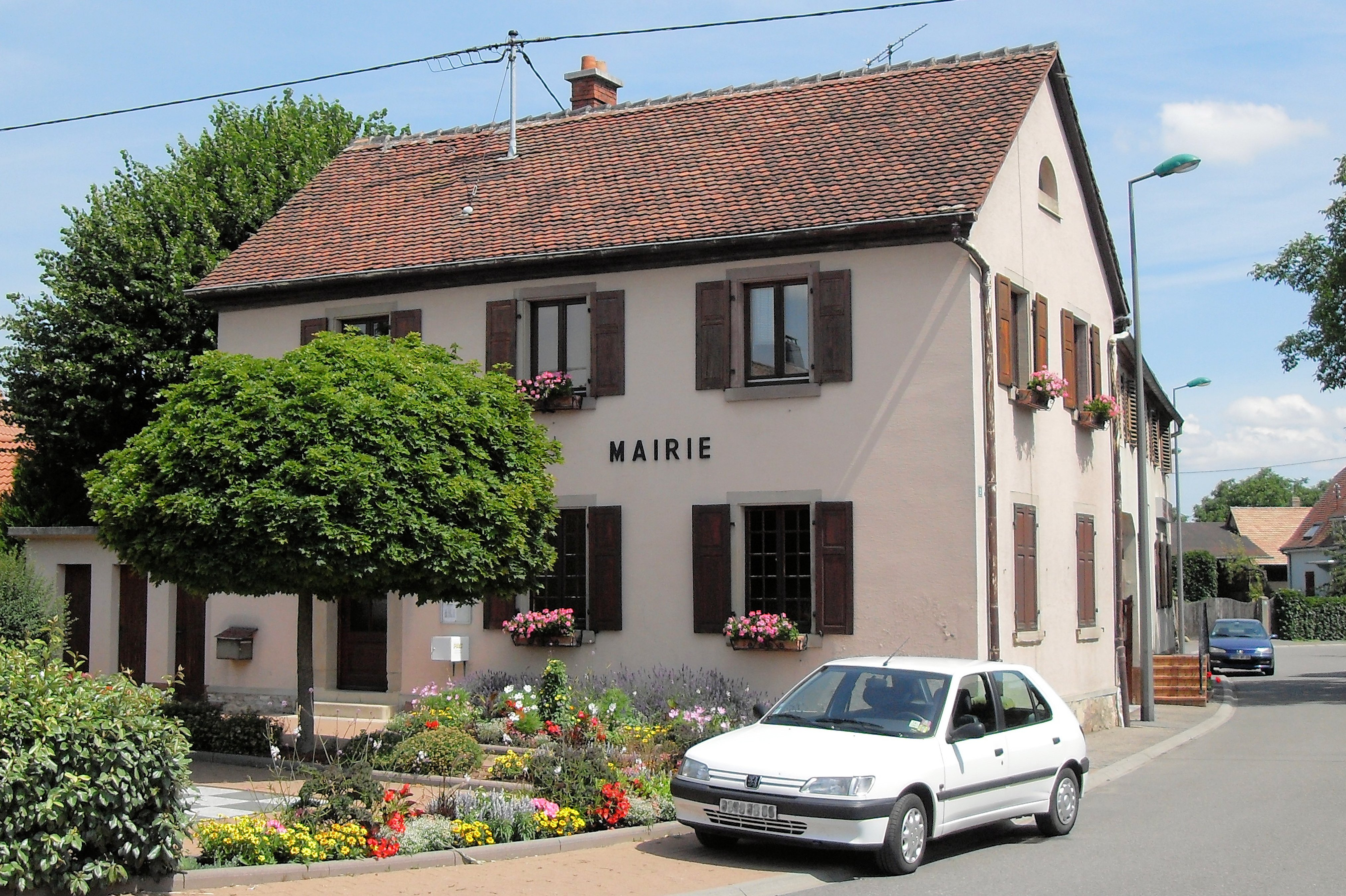 La mairie de Nambsheim